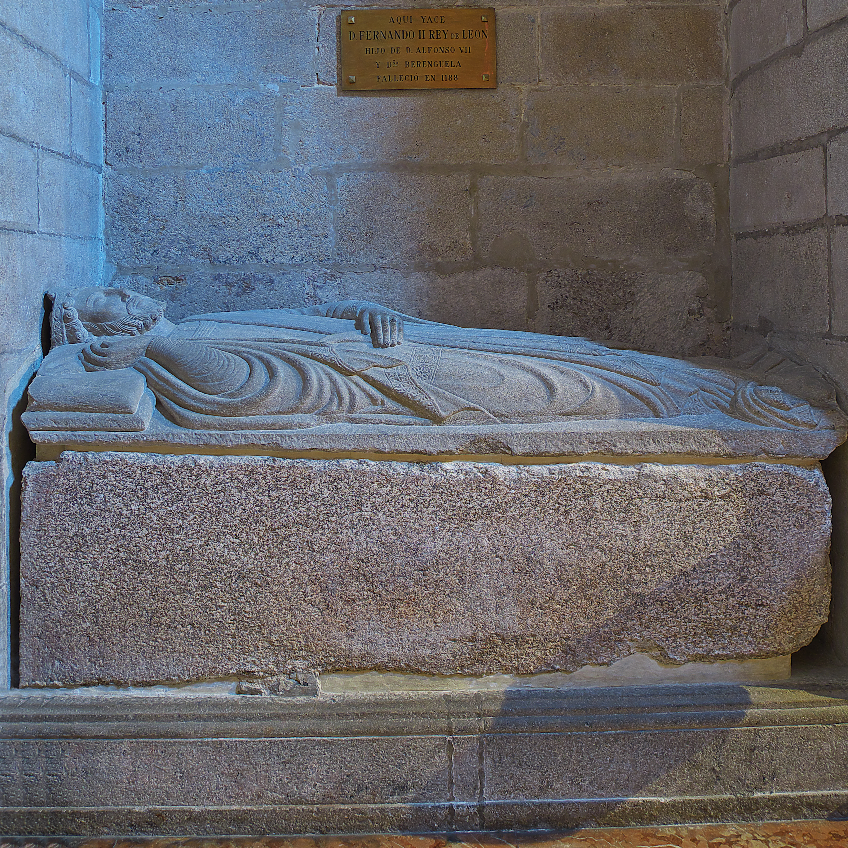 Catedral de Santiago de Compostela. Alfonso IX de León ordena la sepultura del rey Fernando II de León (†1188) en la catedral de Santiago. Primera mitad del siglo III.